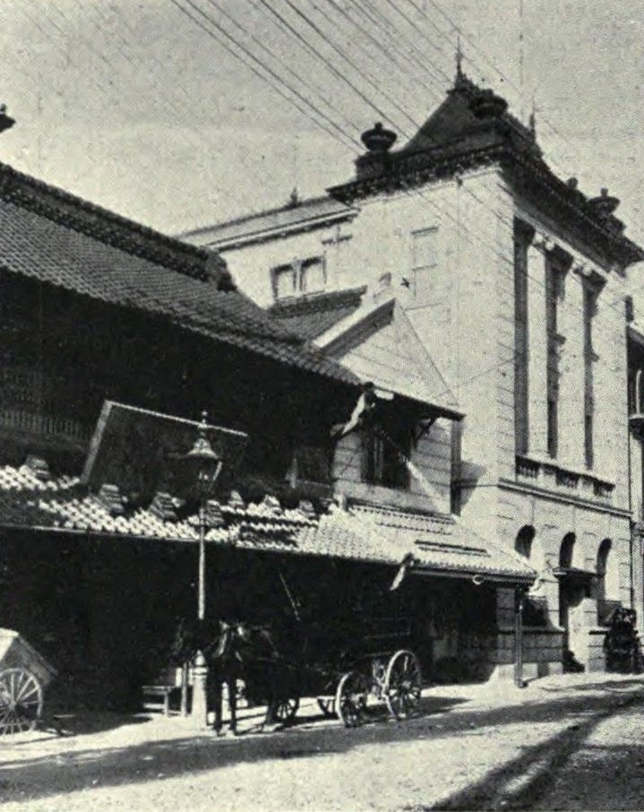 博文館 明治時代